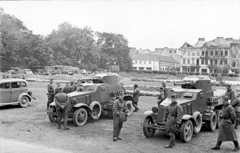 Russischer Offiziersbesuch in Lublin. Die sowjetrussischen Offiziere, die zu Verhandlungen mit den deutschen Militärbehörden über die Festsetzung der Grenze zwischen den beiderseitigen Interessengebieten im besetzten Polen in Lublin eintrafen, waren von zwei Panzerspähwagen der russischen Armee begleitet. Wie unser Bild zeigt, fand[en] diese Fahrzeuge bei unseren Soldaten verständliches Interesse. Urhebervermerk: PK-Scherl 3.10.39 [Herausgabedatum] 12026-39 ADN-ZB/Archiv II.Weltkrieg 1939 - 45; Der Feldzug in Polen, September 1939 Deutsche Soldaten besichtigen zwei sowjetische Panzerspähwagen, mit denen Offiziere der Roten Armee am 22.9. nach Lublin zu Verhandlungen über die Demarkationslinie zwischen Deutschland und der UdSSR gekommen sind. 12026-39 [Fotograf: Höllenthal]